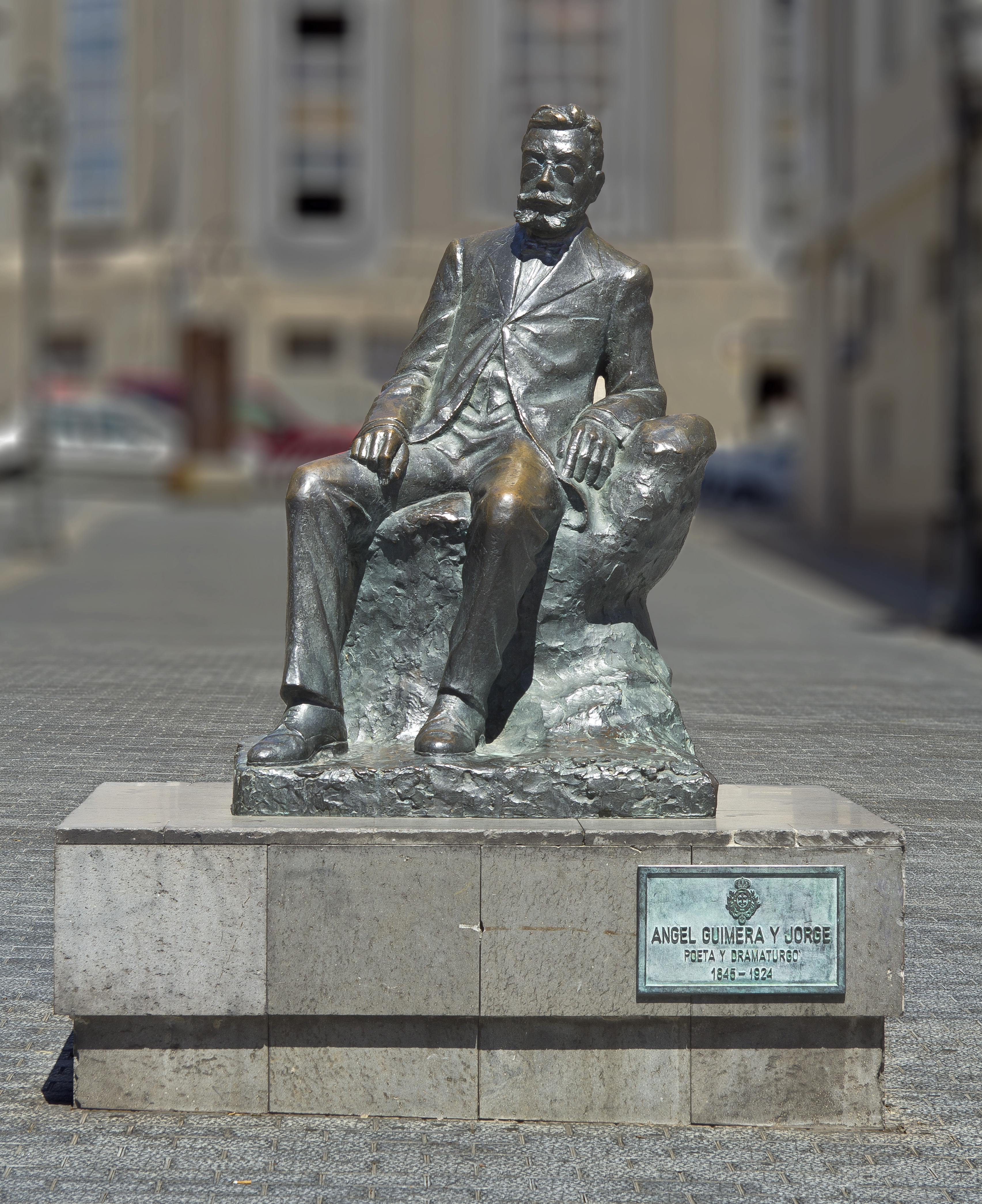 Das Standbild für Ángel Guimerá in Santa Cruz de Tenerife auf der Plaza de la Isla de Madeira wurde vermutlich von Josep Cardona Furro geschaffen. Eine gleiche Statue befindet sich in Barcelona.